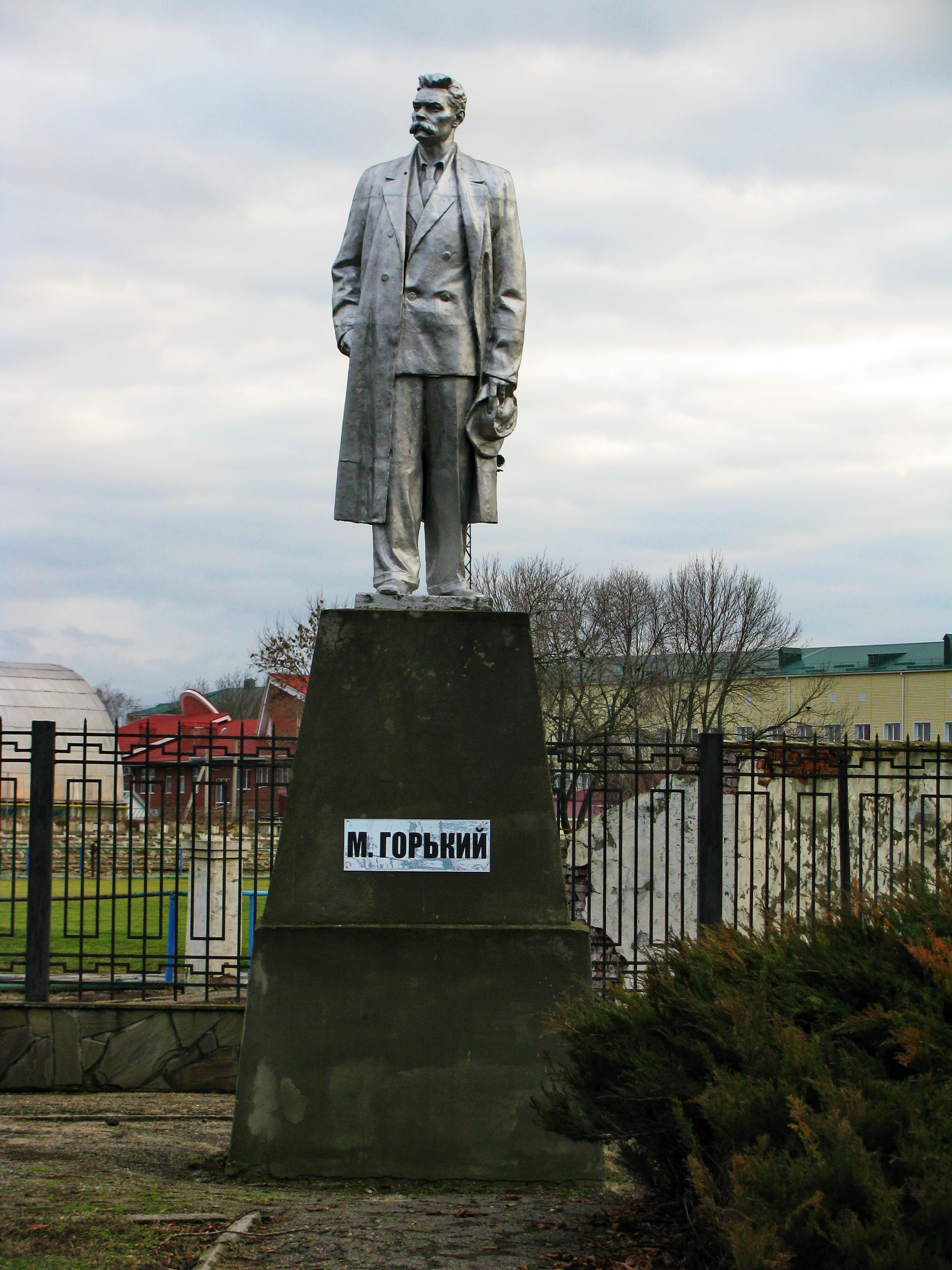 Памятник А.М.Горькому: улица Горького, станица Павловская, Павловский район, Краснодарский край